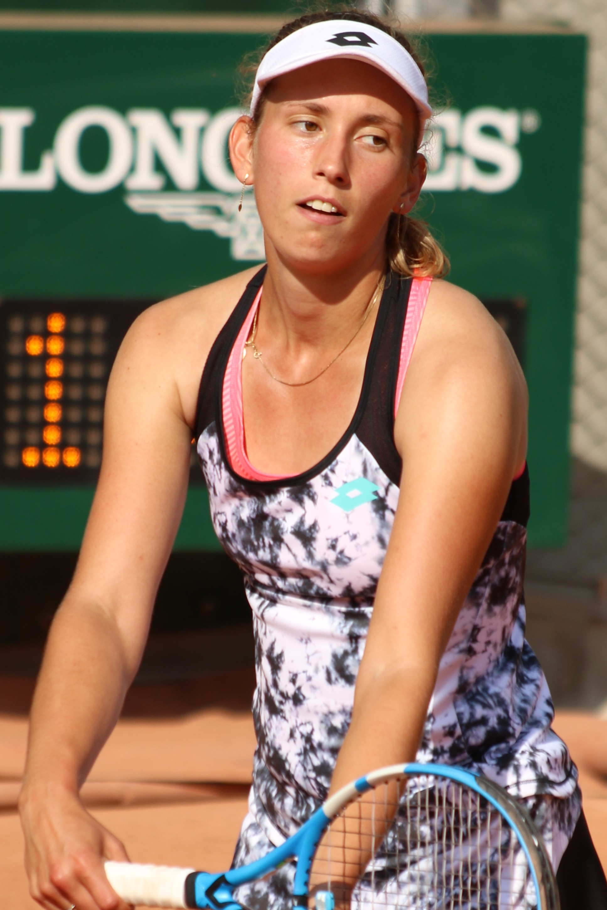 Mertens RG18 (14)